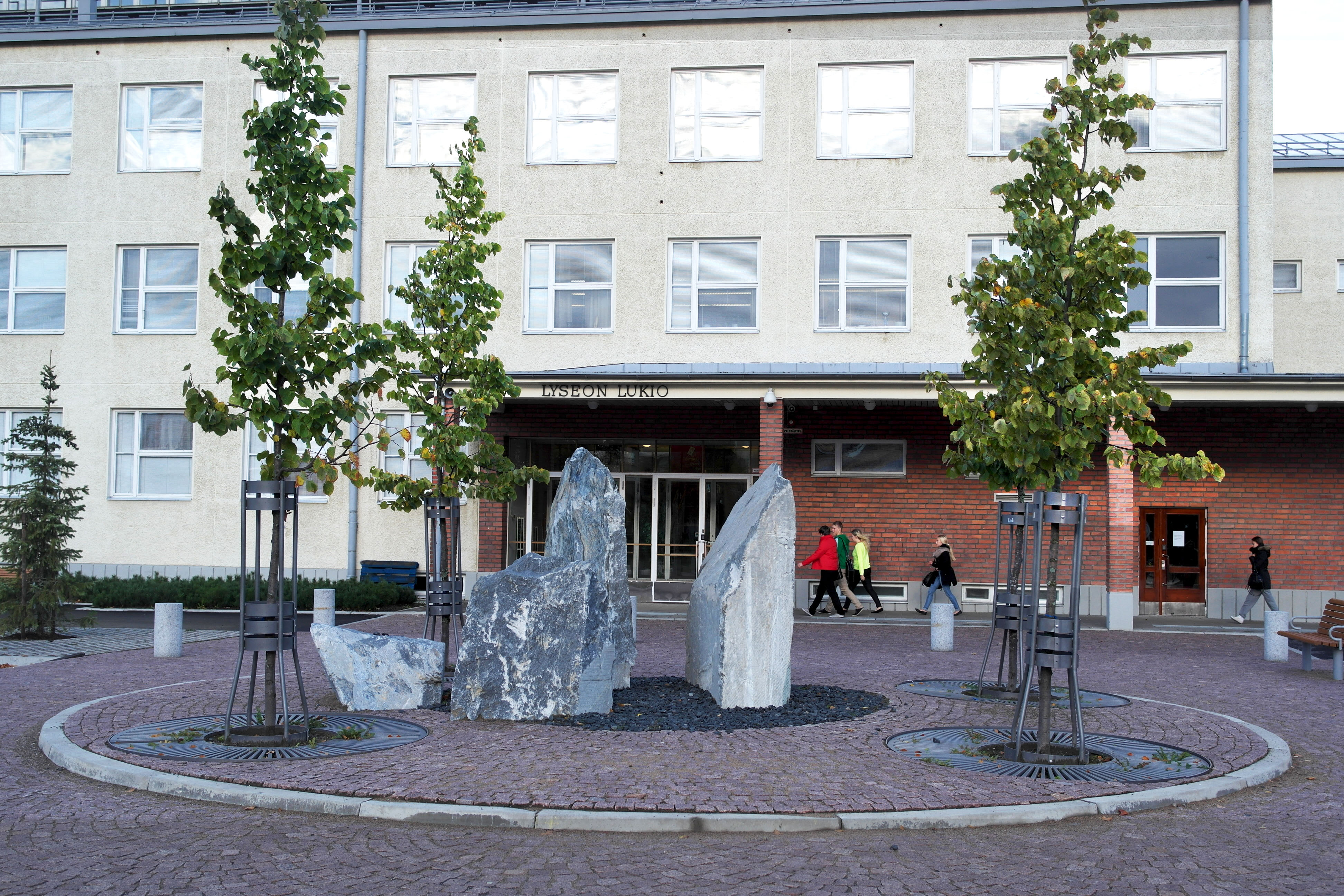 Joensuun lyseon lukio